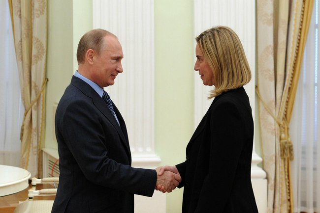 Встреча с Министром иностранных дел Италии Федерикой Могерини